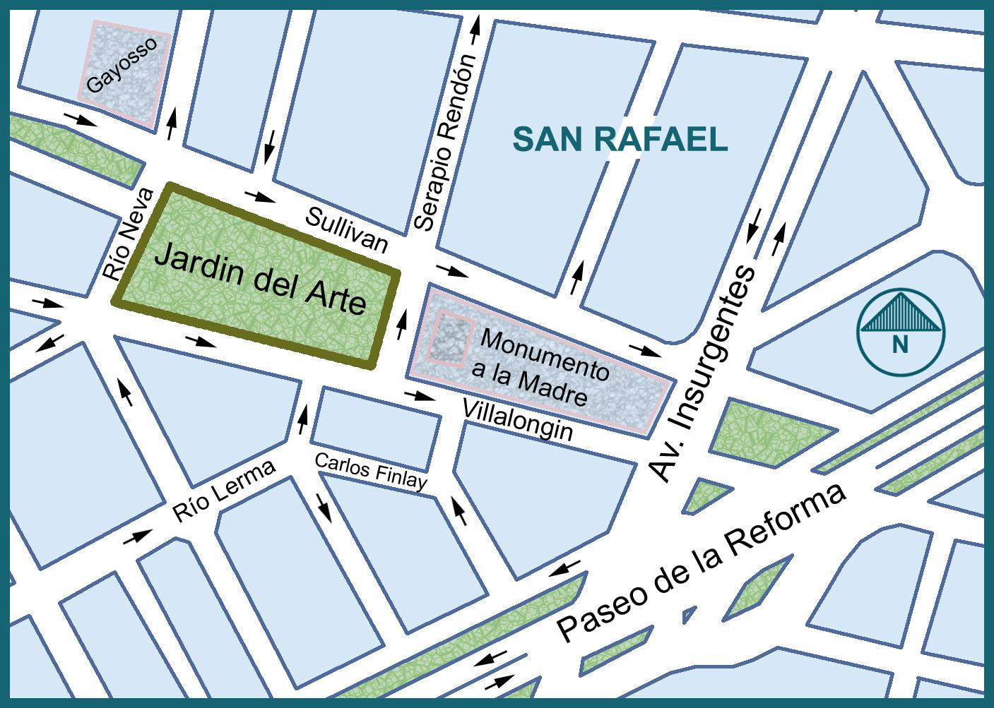 Plano de ubicacion del Jardin del Arte Sullivan, Mexico D.F.